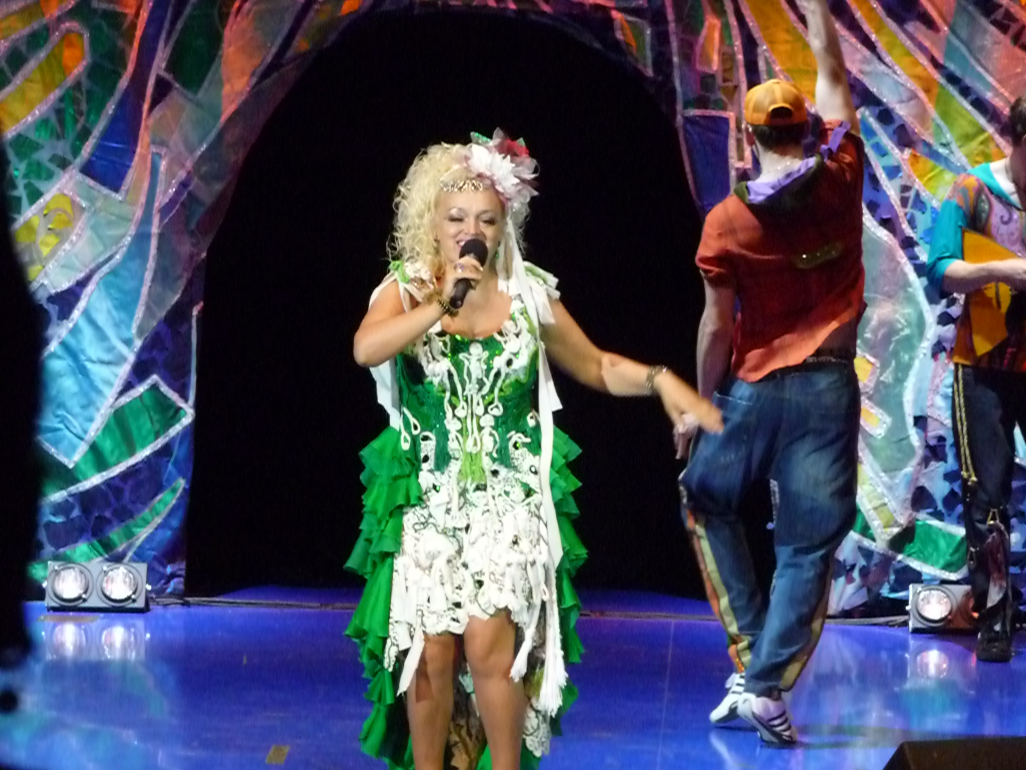 Nadieshda-p1040191.jpg